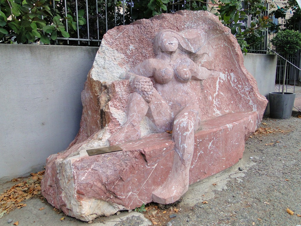 sculpture monumentale en marbre incarnat de Caunes-Minervois